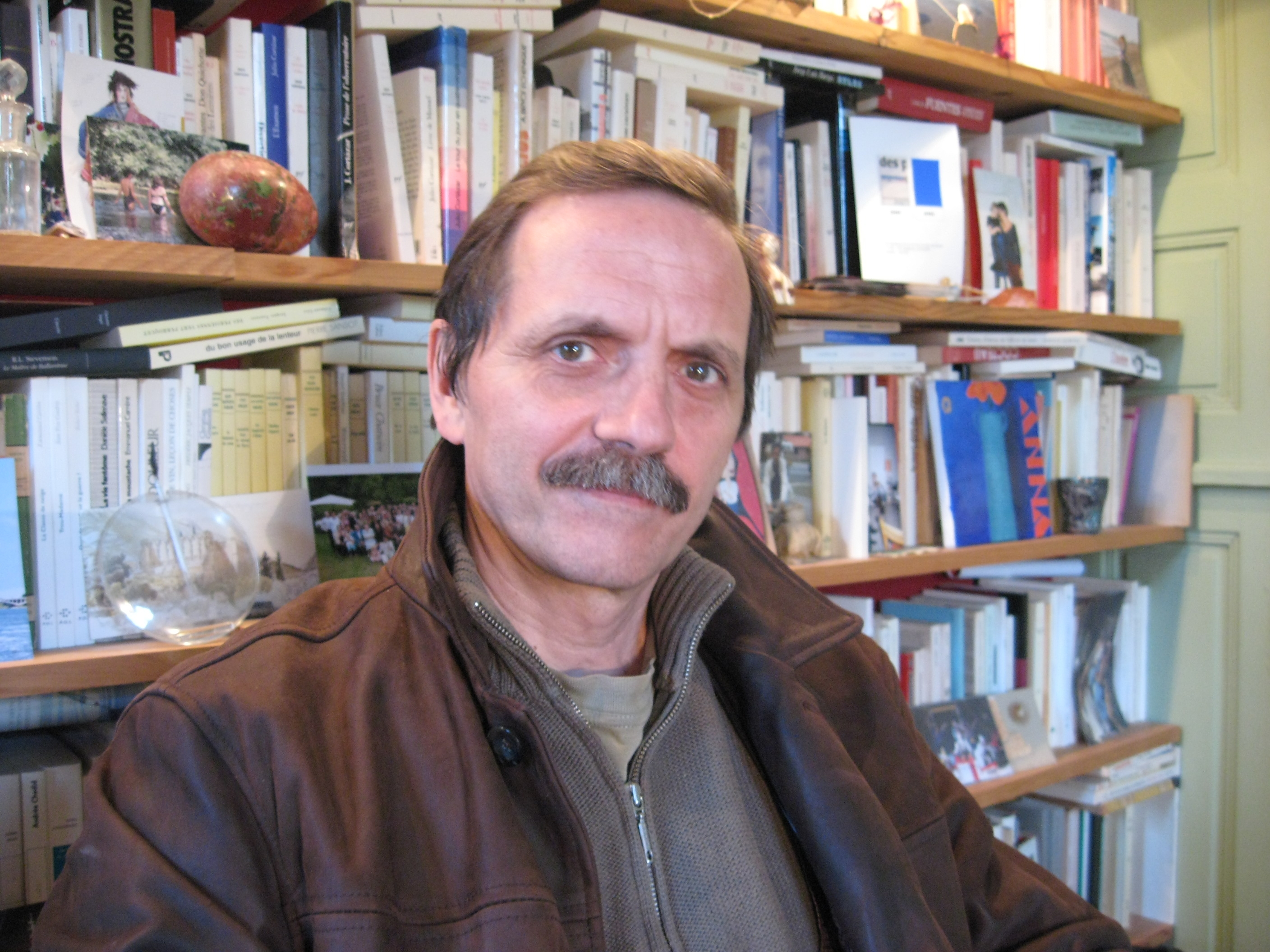 Portrait de Jean-Marie Laclavetine